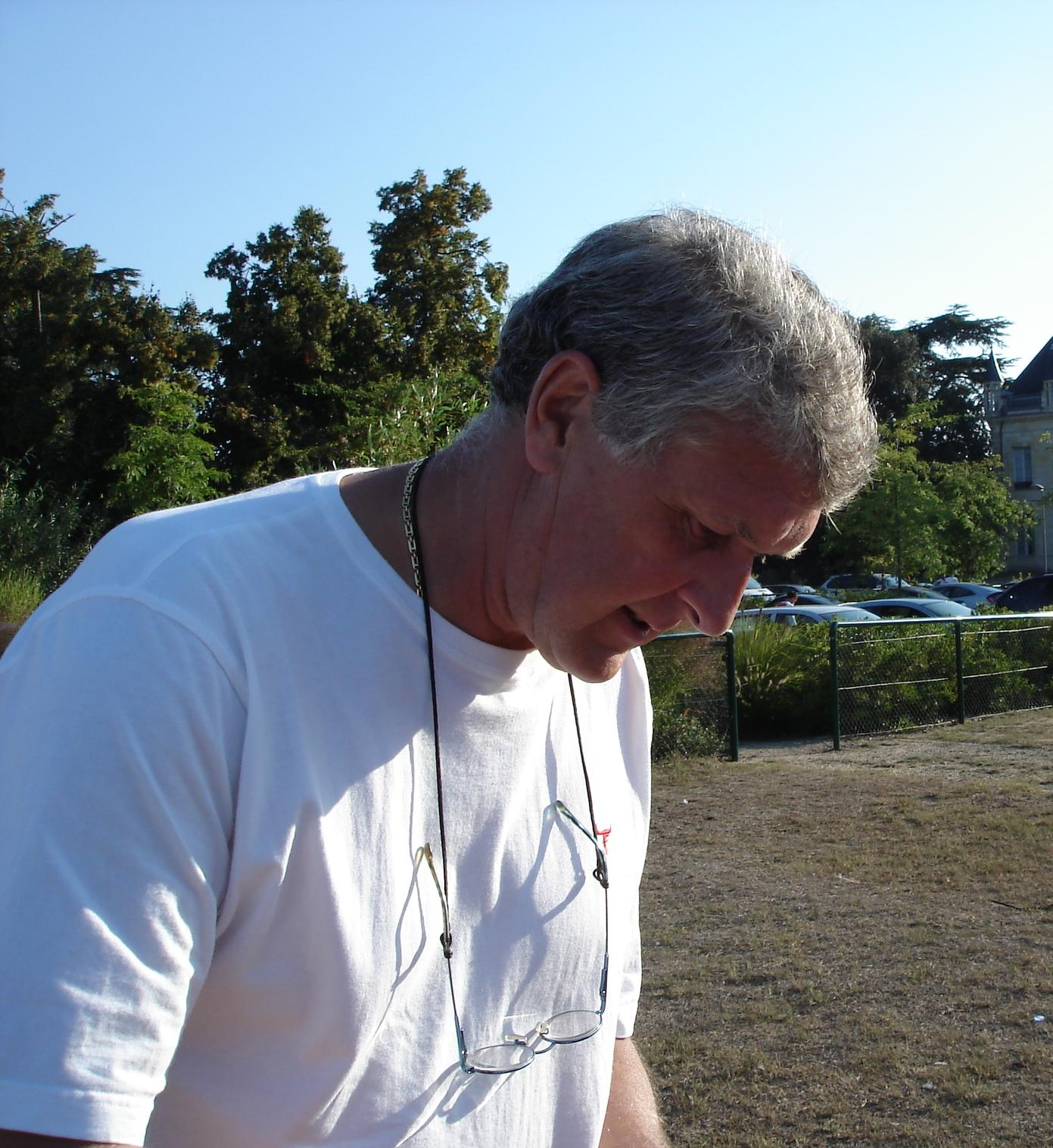 Dominique Dropsy ancien gardien de but des Girondins de Bordeaux